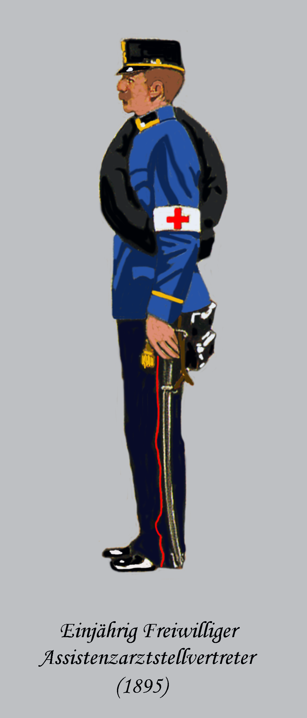 Einjährig-Freiwilliger Assistenzarztstellvertreter